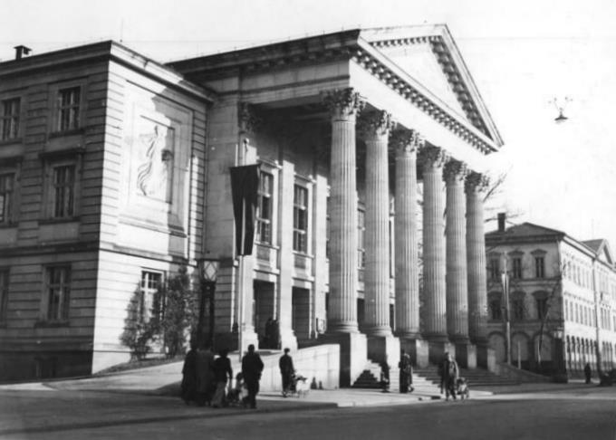 Meiningen, Theater Zentralbild Albrecht 18.5.1953 800 Jahre Meiningen. 1953 werden die Bürger von Meiningen das achthundertjährige Bestehen ihrer Stadt im Meininger Theater feiern. UBz: Das Meininger Theater. In diesem Jahr feiert die Thüringische Stadt Meiningen ihr 800-jähriges Bestehen. Mit zahlreichen Feierlichkeiten und einem Festakt im Meininger Theater wird das Jubiläum begangen. Nachdem das Theater 1908 niedergebrannt war, konnte es nach seinem Wiederaufbau 1909 eröffnet werden und ist heute eine weit über Südthüringen bekannte Kulturstätte.